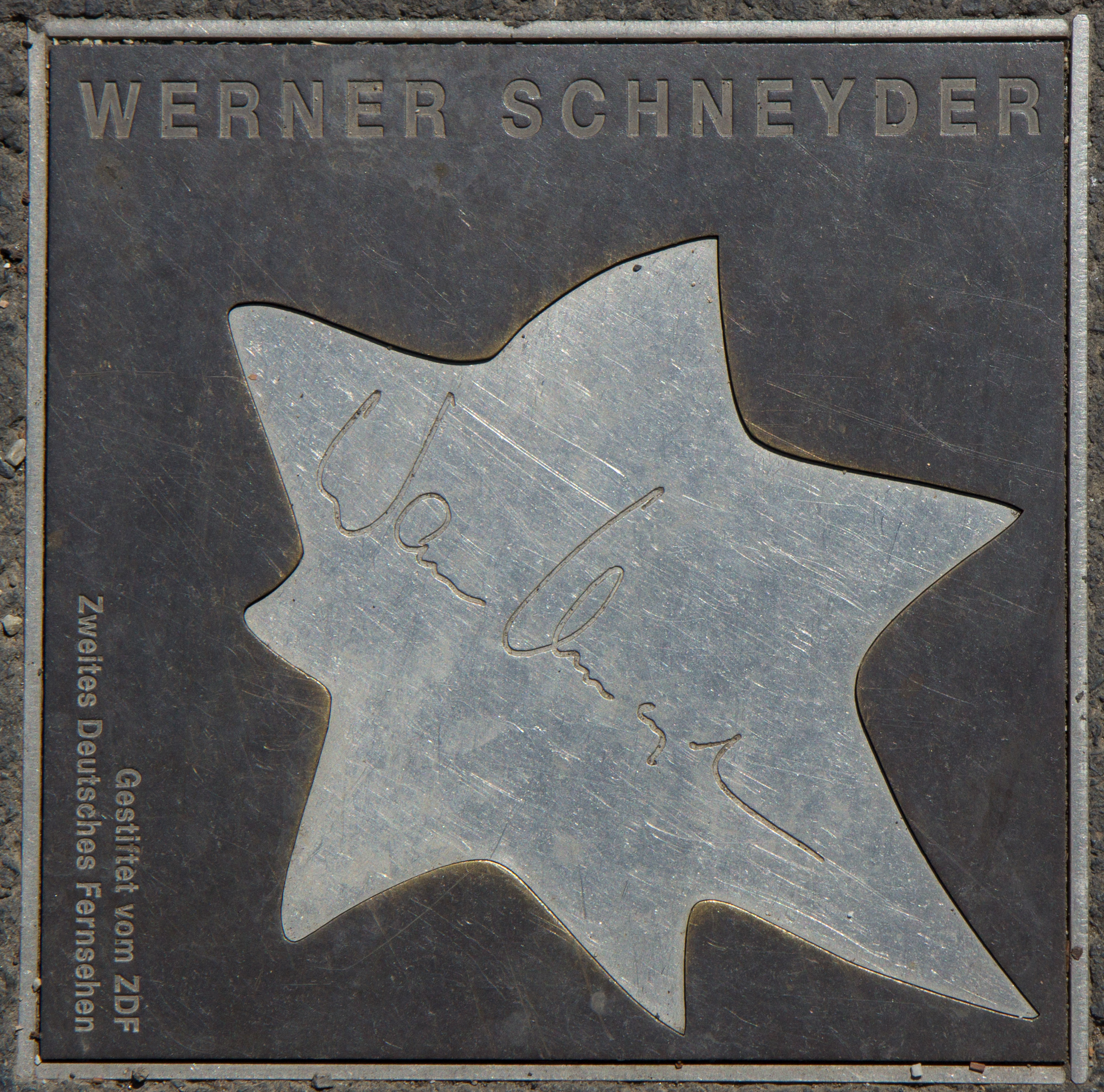 Sterne der Satire - Walk of Fame des Kabaretts in Mainz. Stern Nr. 60 von Werner Schneyder.